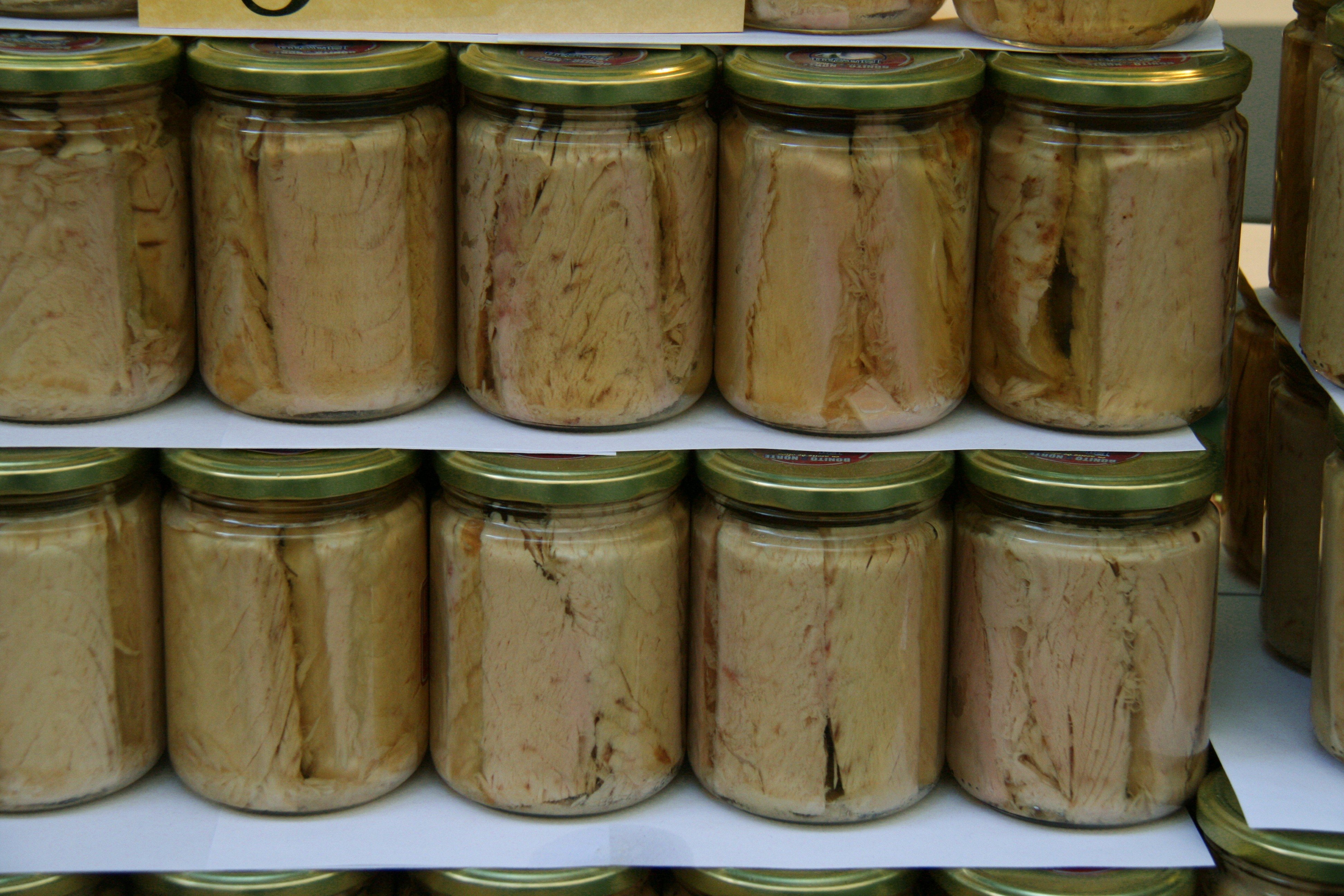 Atún en botes